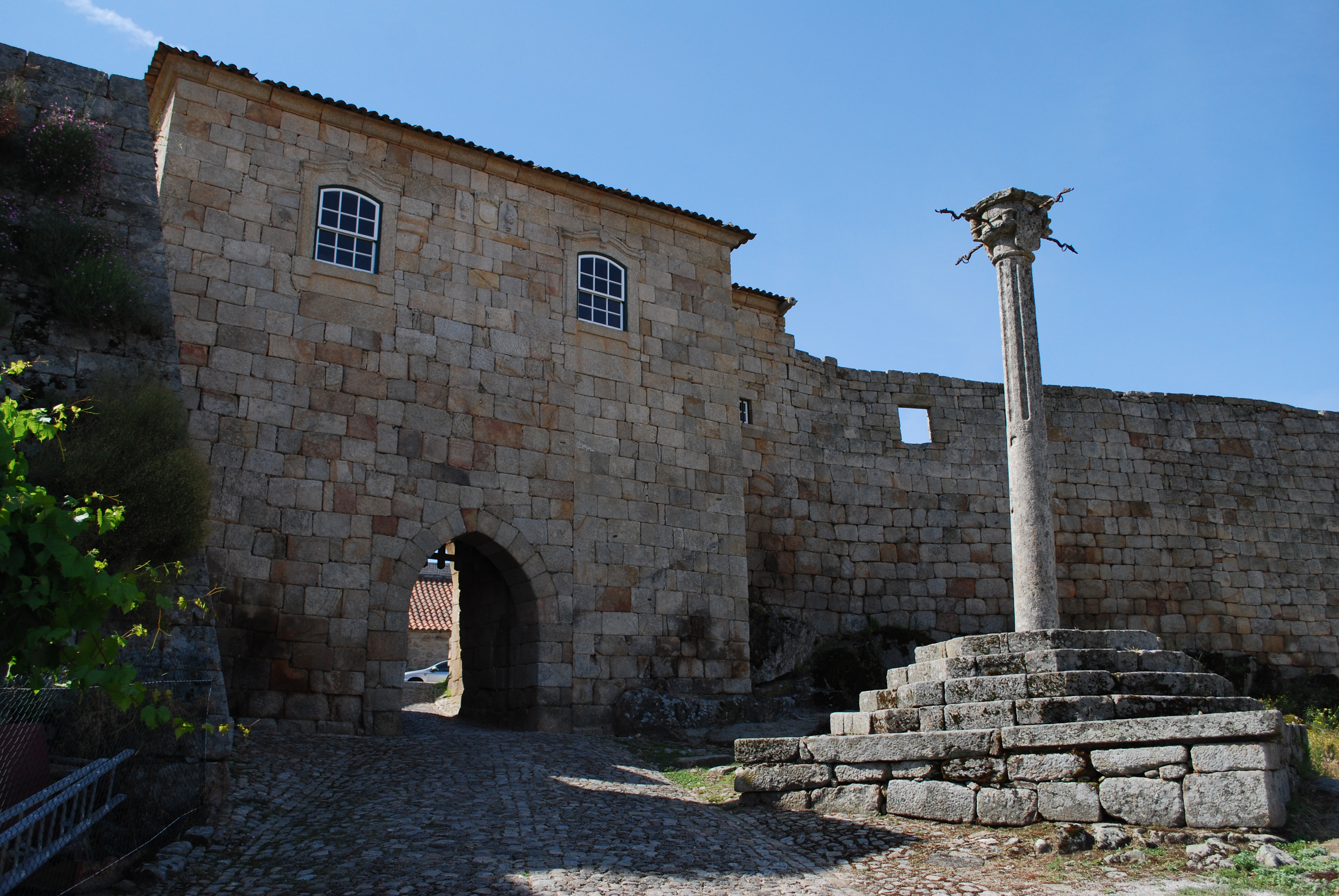 Casa da Câmara (porta de entrada no Castelo de Penamacor, hoje Posto de Turismo) e o pelourinho This file was uploaded for Wiki Loves Monuments in Portugal with the unique identifier 73805.